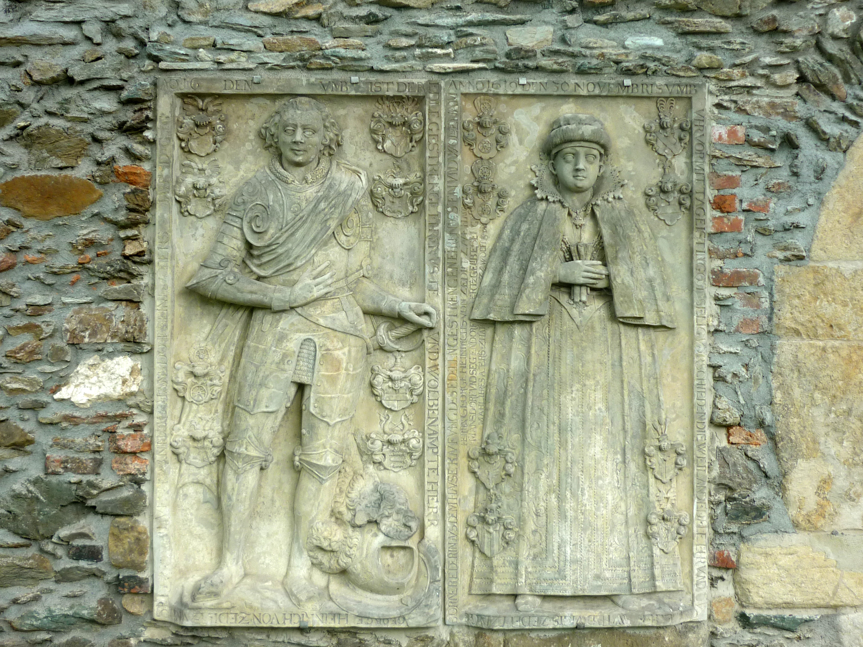 Epitaph der Patronatsherren Georg Heinrich von Zedlitz und seiner Frau Hedwig von Zedlitz († 30. Nov. 1619) an der ehemaligen evangelischen Kirche in Tiefhartmannsdorf (Podgórki) im Bober-Katzbach-Gebirge in Niederschlesien.